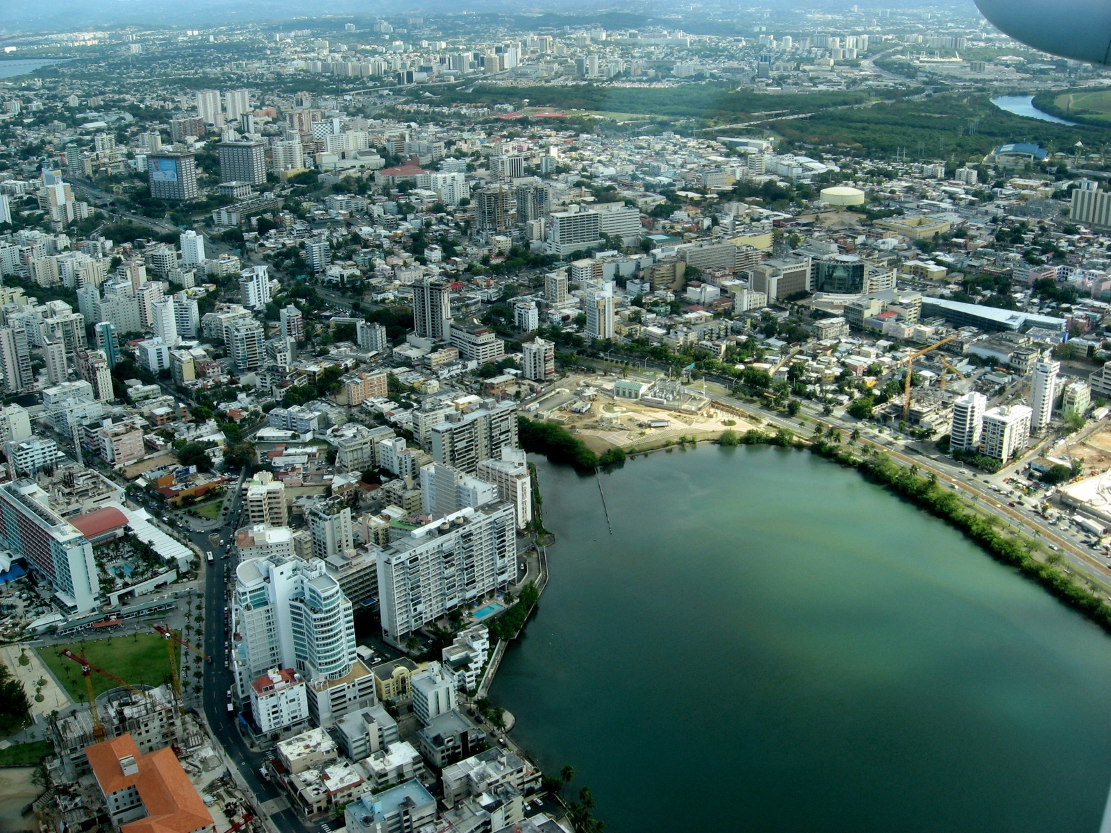 San Juan desde arriba